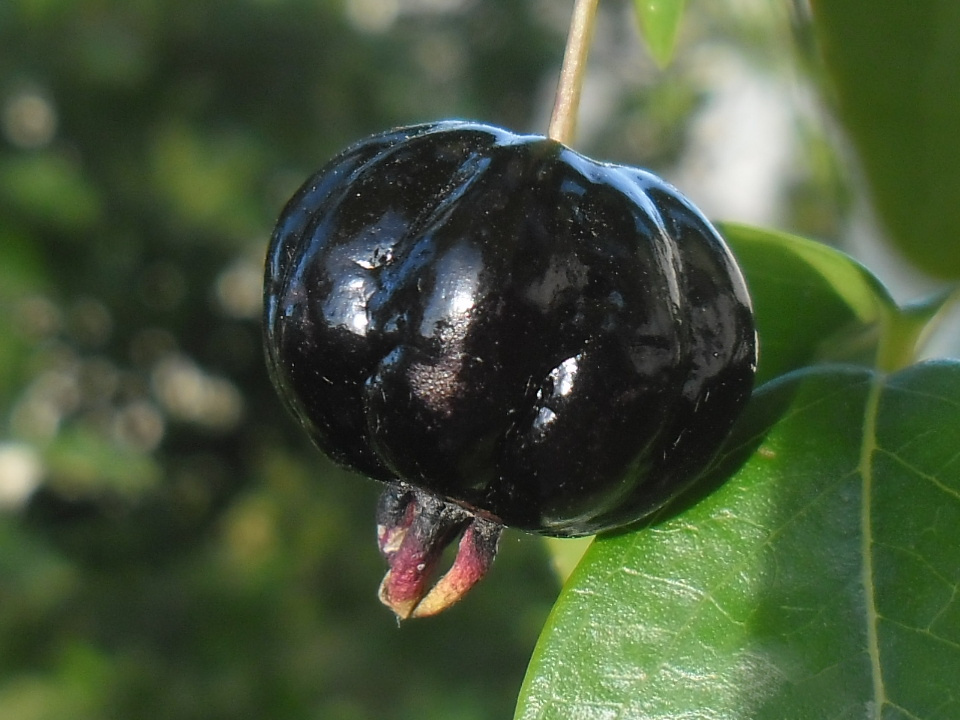 Fruto maduro de eugenia uniflora variedad negra Argentina.